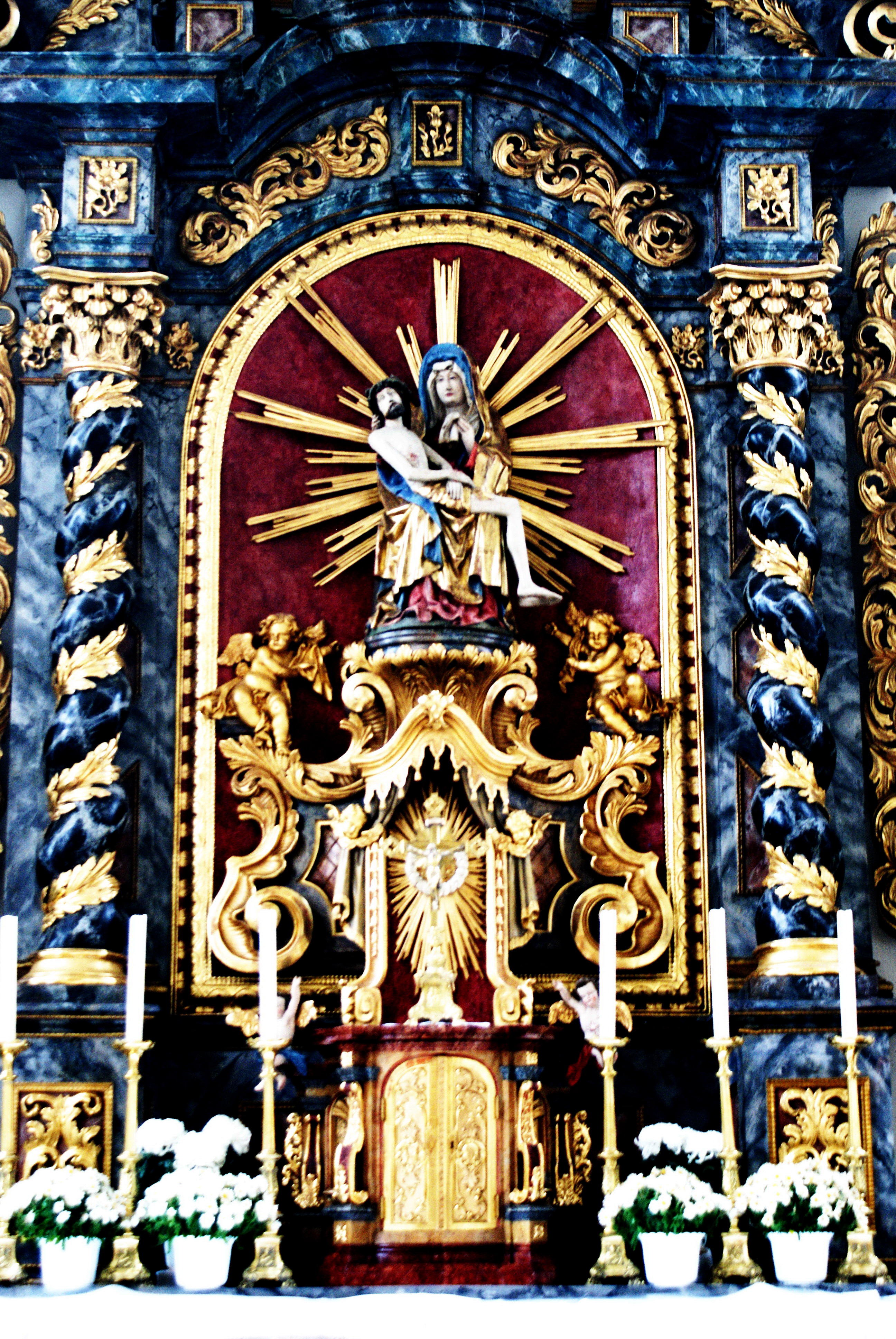 Wallfahrsbild von Deutstetten. Bei einem verheerenden Hochwasser am 24. Februar 1417 (1429) wurde die Stadt nicht nur vor schlimmen Schäden verschont, sondern es wurde der Überlieferung nach auch diese Pietà angeschwemmt, deren Herkunft bis heute unklar ist. Seit 600 Jahren wird dieses Gnadenbild verehrt